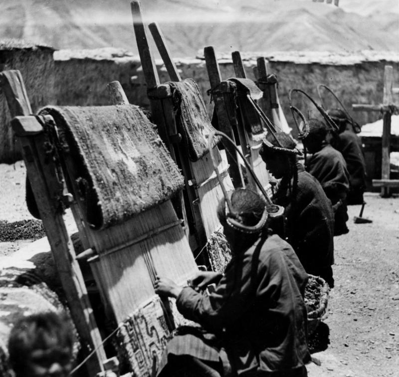 Gyantse, Teppichweberei Pala, Teppichknüpfen